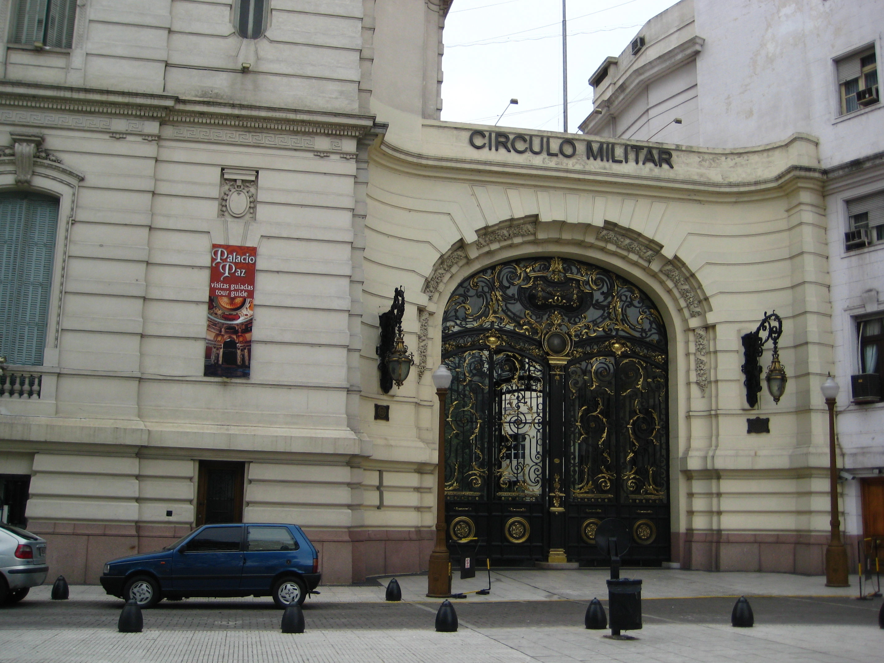 Círculo Militar, Buenos Aires, Argentina.